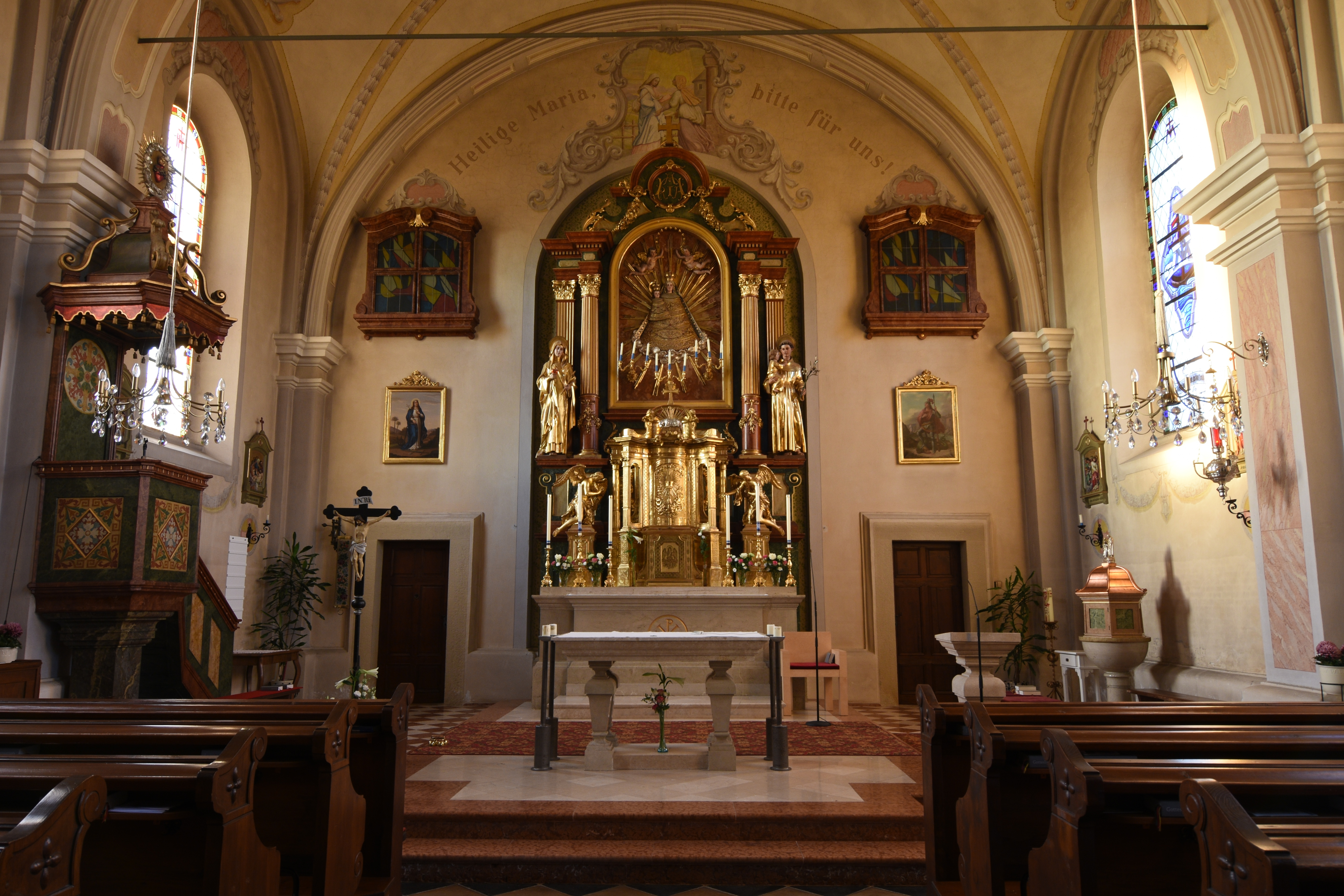 Pfarrkirche Eichkögl - Interior